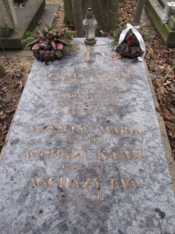 Aggházy Kamil (Budapest, 1882. november 1. – Budapest, 1954. szeptember 14.) magyar királyi ezredes a Hadtörténeti Intézet és Múzeum alapítója. Katonai szakíró, hadtörténész. Verseket és elbeszéléseket is írt.